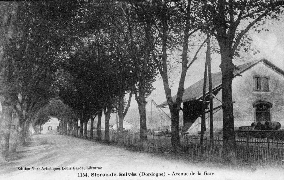 L'avenue de la gare avec à droite la halle à marchandises un quai et une grue.